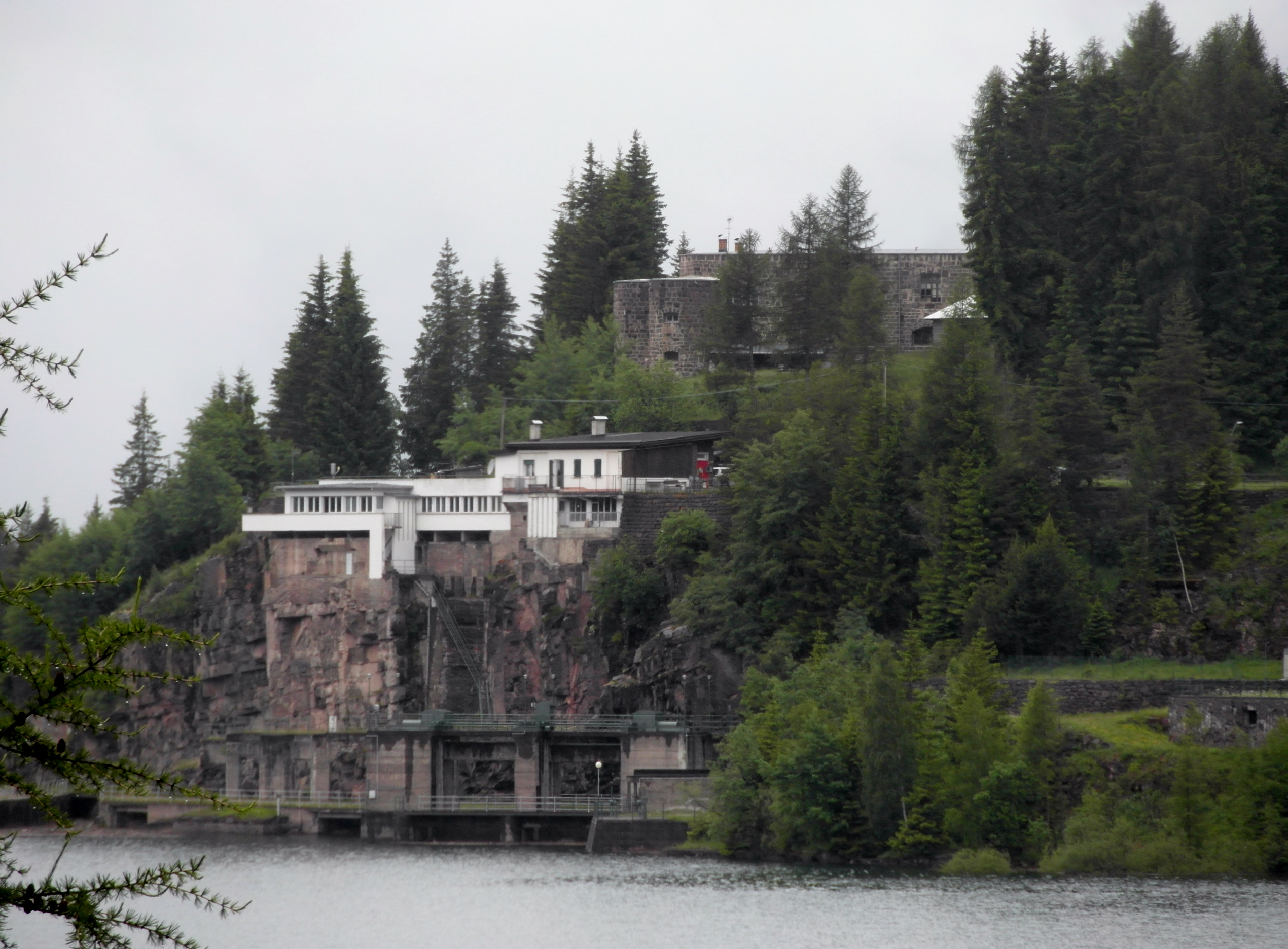 Lago di Paneveggio con il Forte Buso